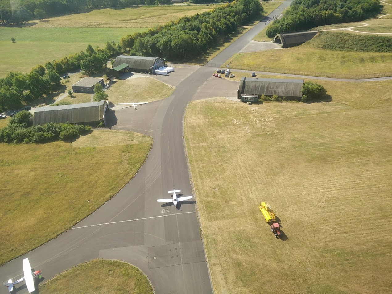 De gebouwen van Vliegclub Twente van boven gezien. Tevens te zien: De PH-RRR die klaar staat om te vertrekken en de PH-TWM die net aankomt.